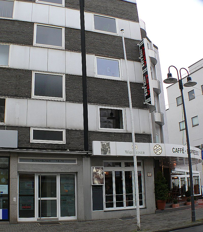 Recklinghausen Hit Radio Vest, eigenes Foto